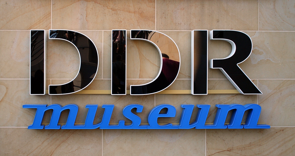 Schriftzug „DDR museum“ am DDR-Museum in Berlin-Mitte.